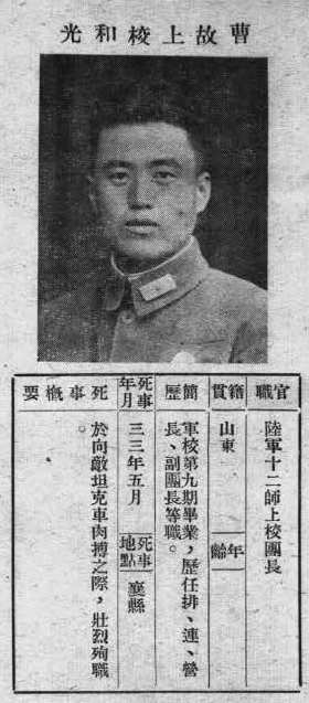 中文（台灣）: 抗戰軍人忠烈錄第一輯中的烈士遺像